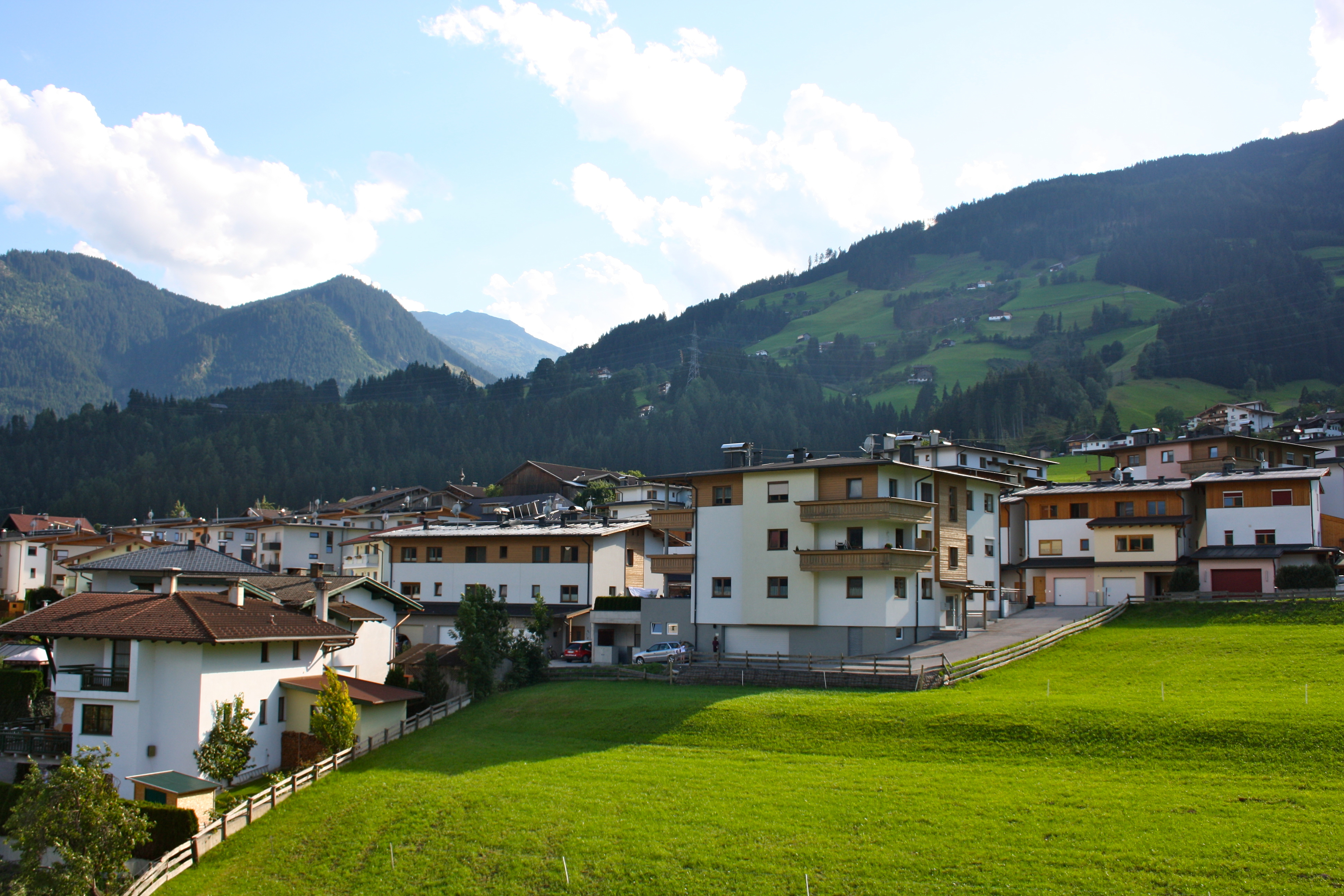 Wohnhäuser in der Gemeinde Fügenberg.